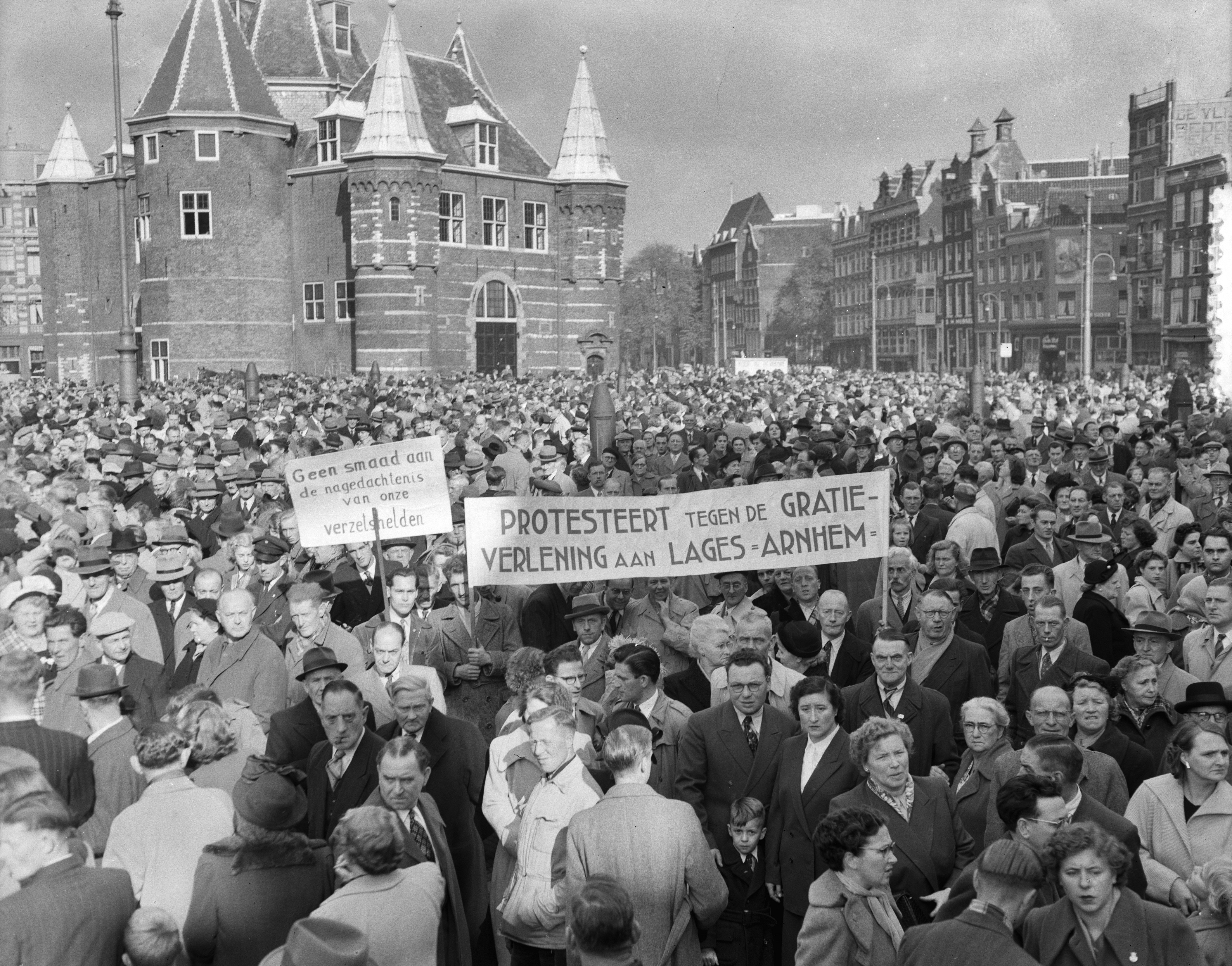 Demonstratie tegen mogelijke amnestie voor Willy Lages, georganiseerd door Lages Comite Amsterdam Datum 12 oktober 1952